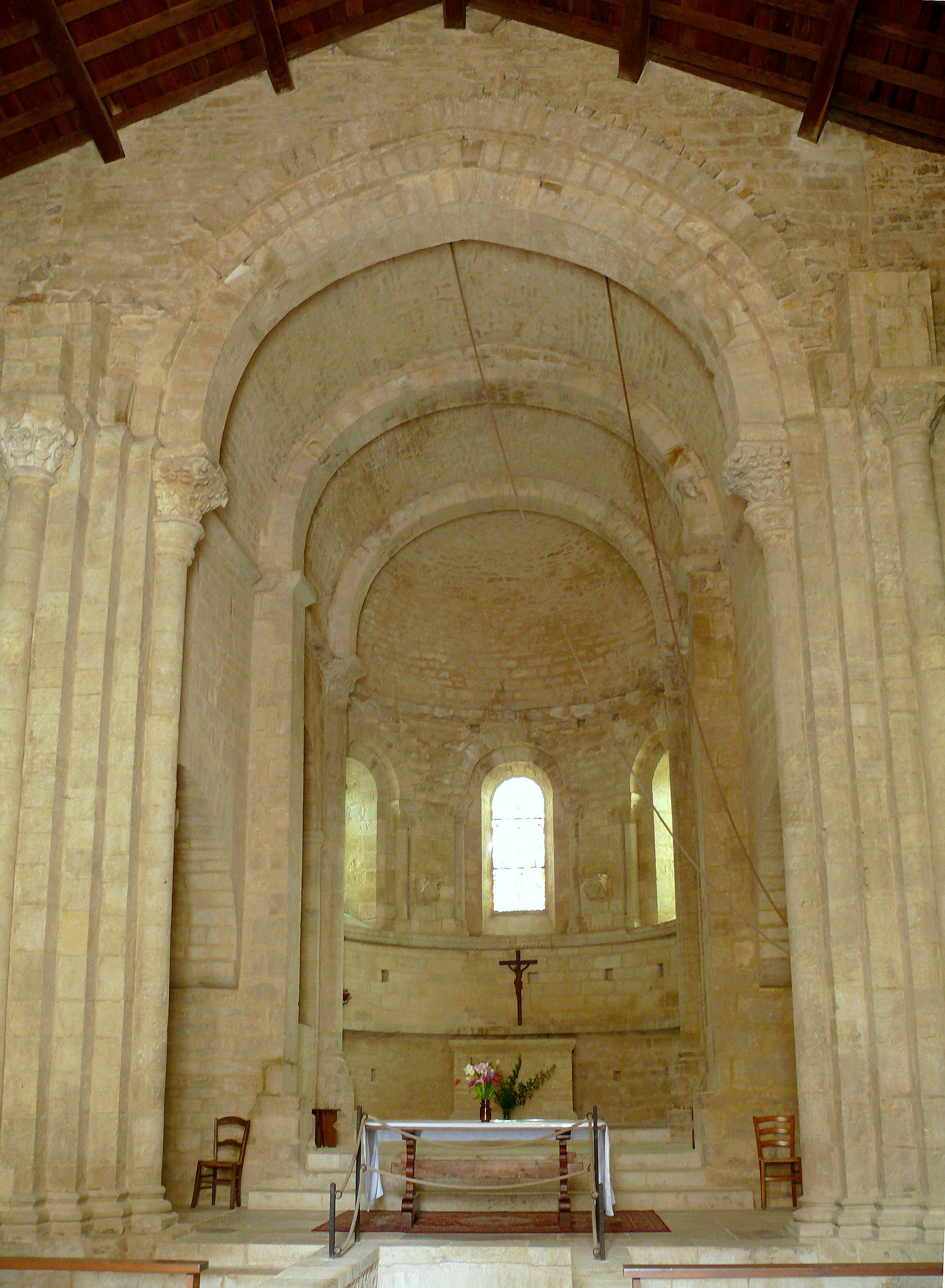 Les Arques - Église Saint-Laurent - Le choeur